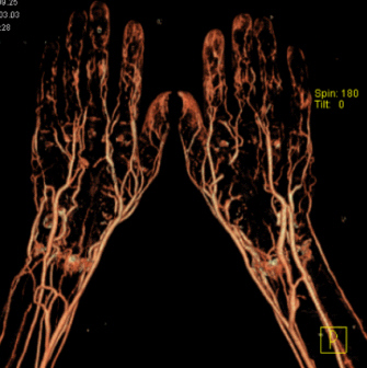 CT-Angiographie der Hände, kontrastmittelgestützt. Volume rendering, Siemens Somatom SR16.